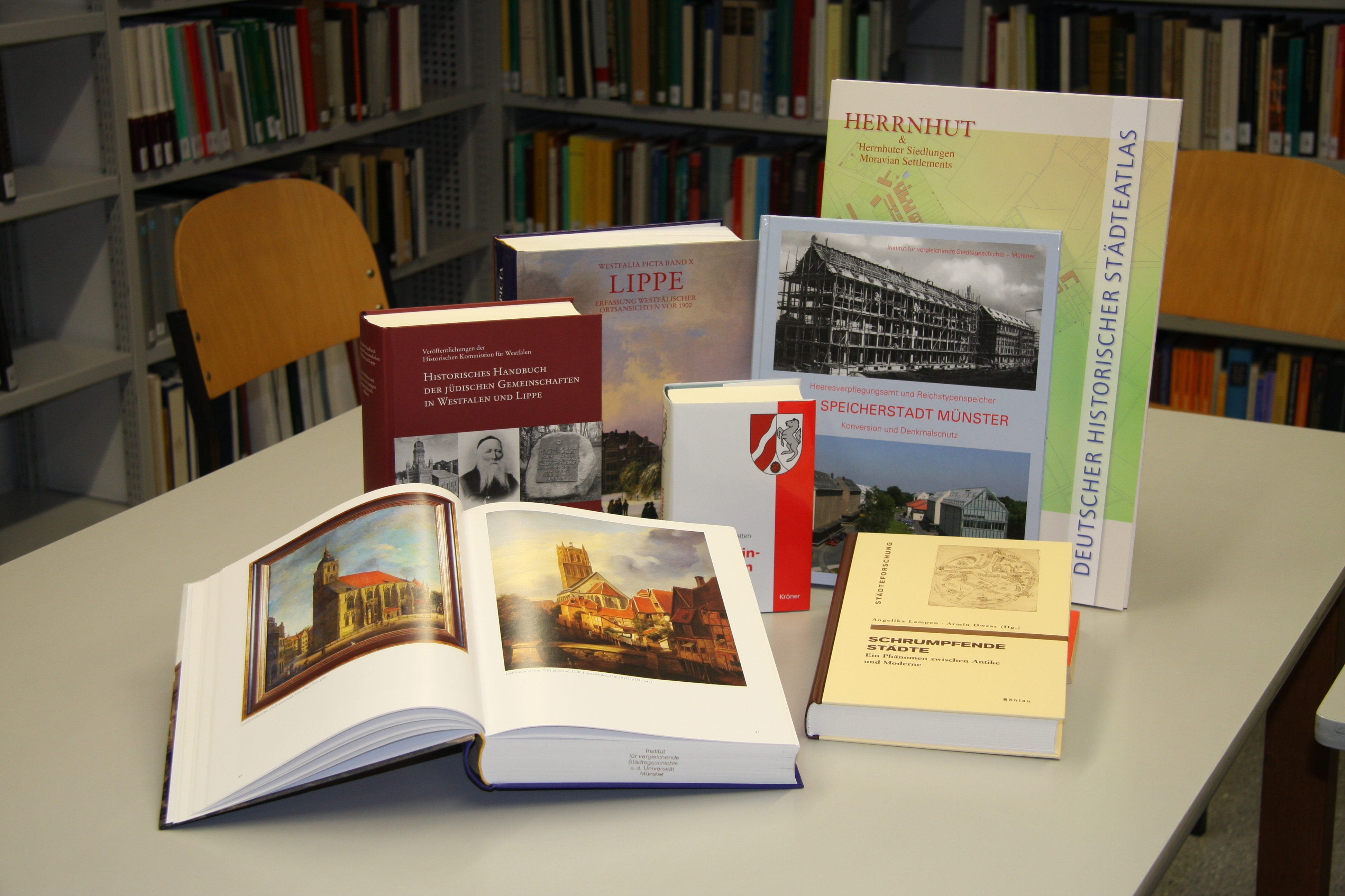 Publikationen